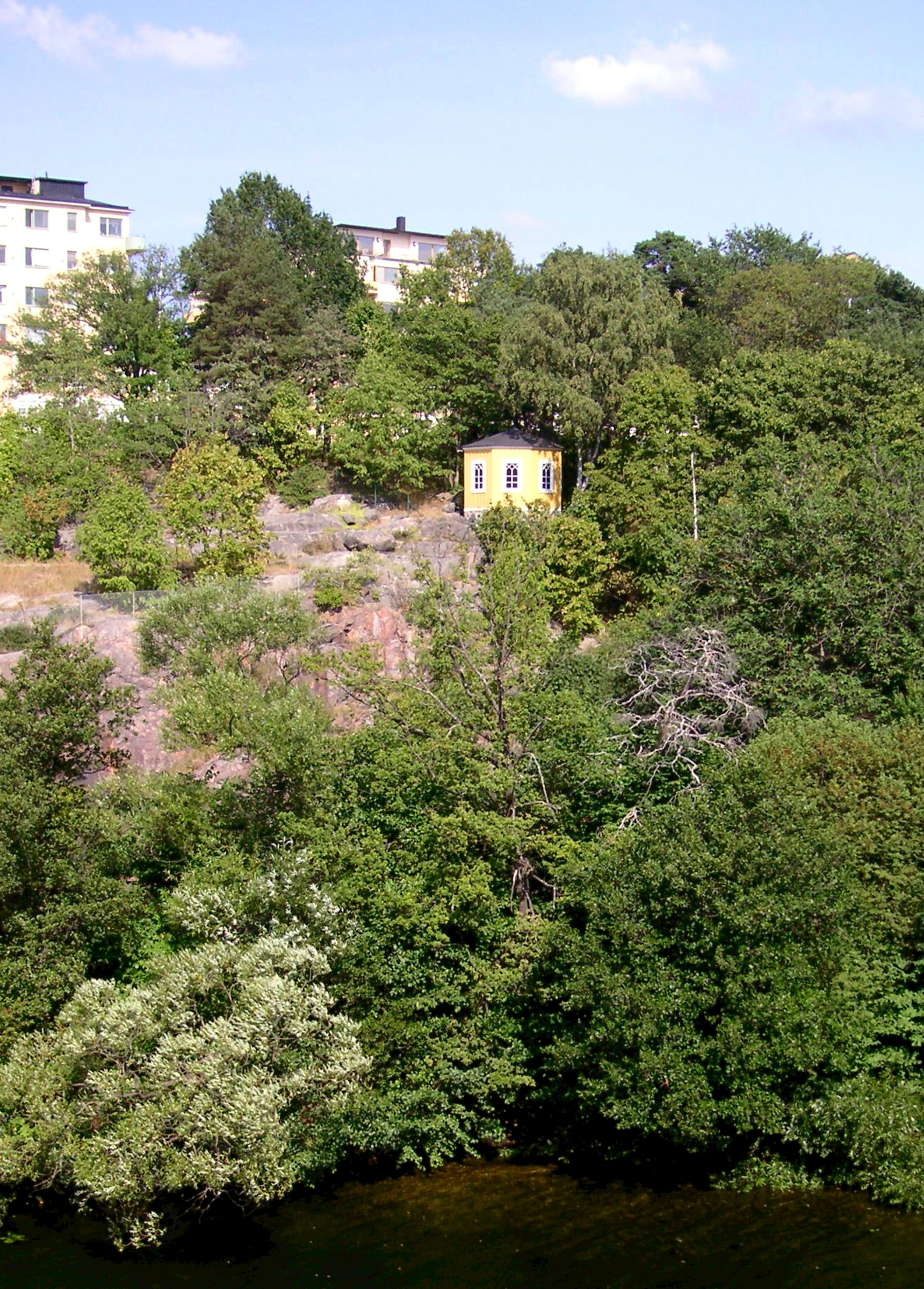 Villa Claestorp, lusthuset, Gjörwellsgatan 48, Kungsholmen